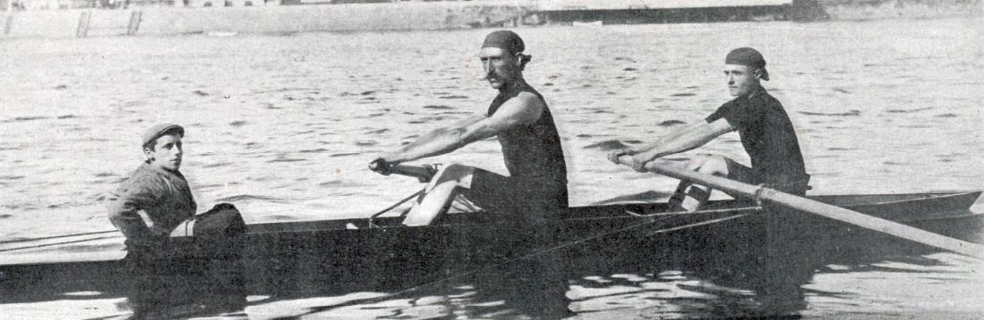 Carlos Deltour (G.) et Antoine Védrenne (D.), du Rowing Club de Castillon, champions d'Europe et de France en 1899.